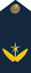 Mayor